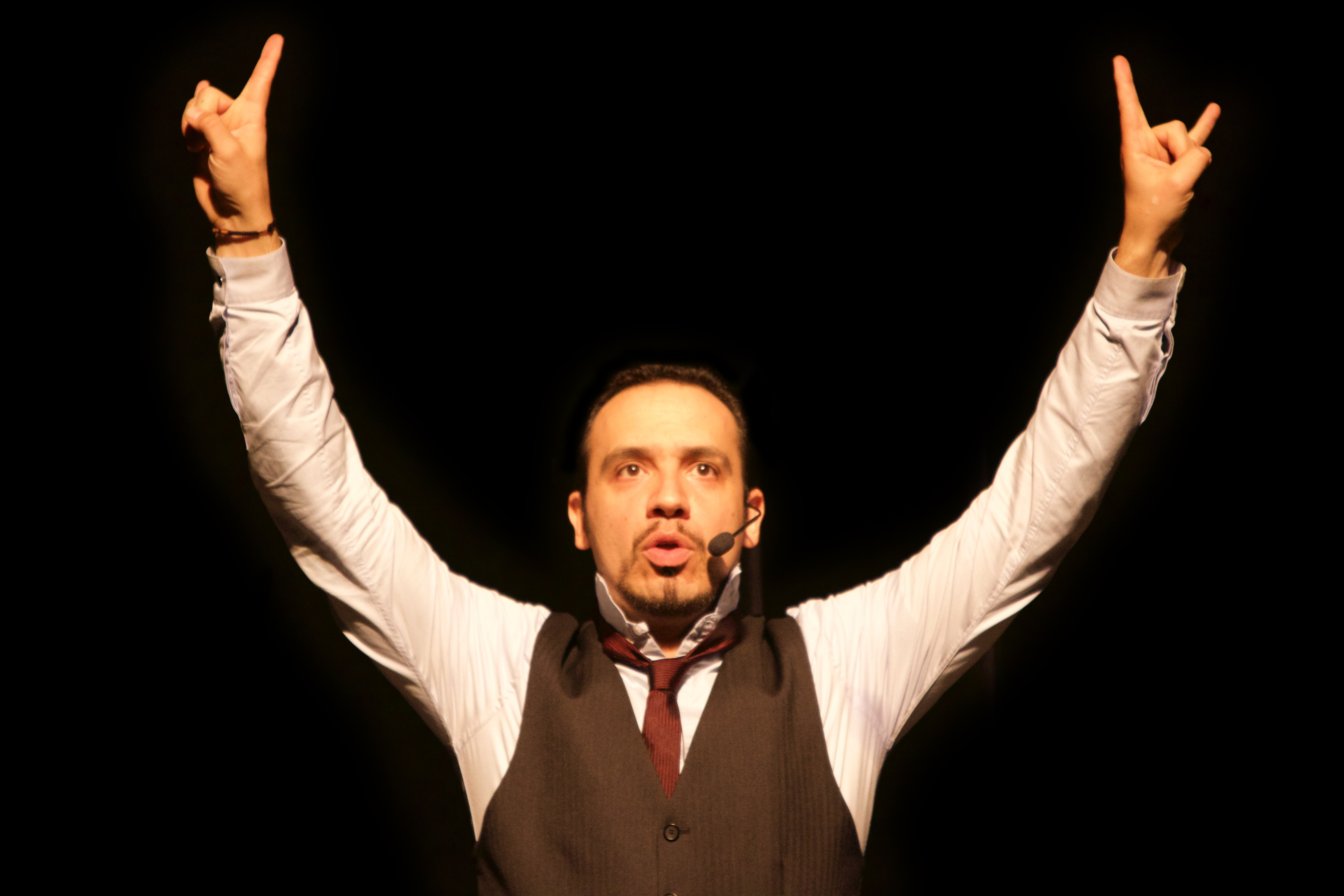 Alexandre Astier lors de l'ExoConférence présenté aux Utopiales de Nantes en 2014